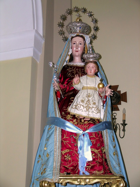 Solopaca, in provincia di Benevento